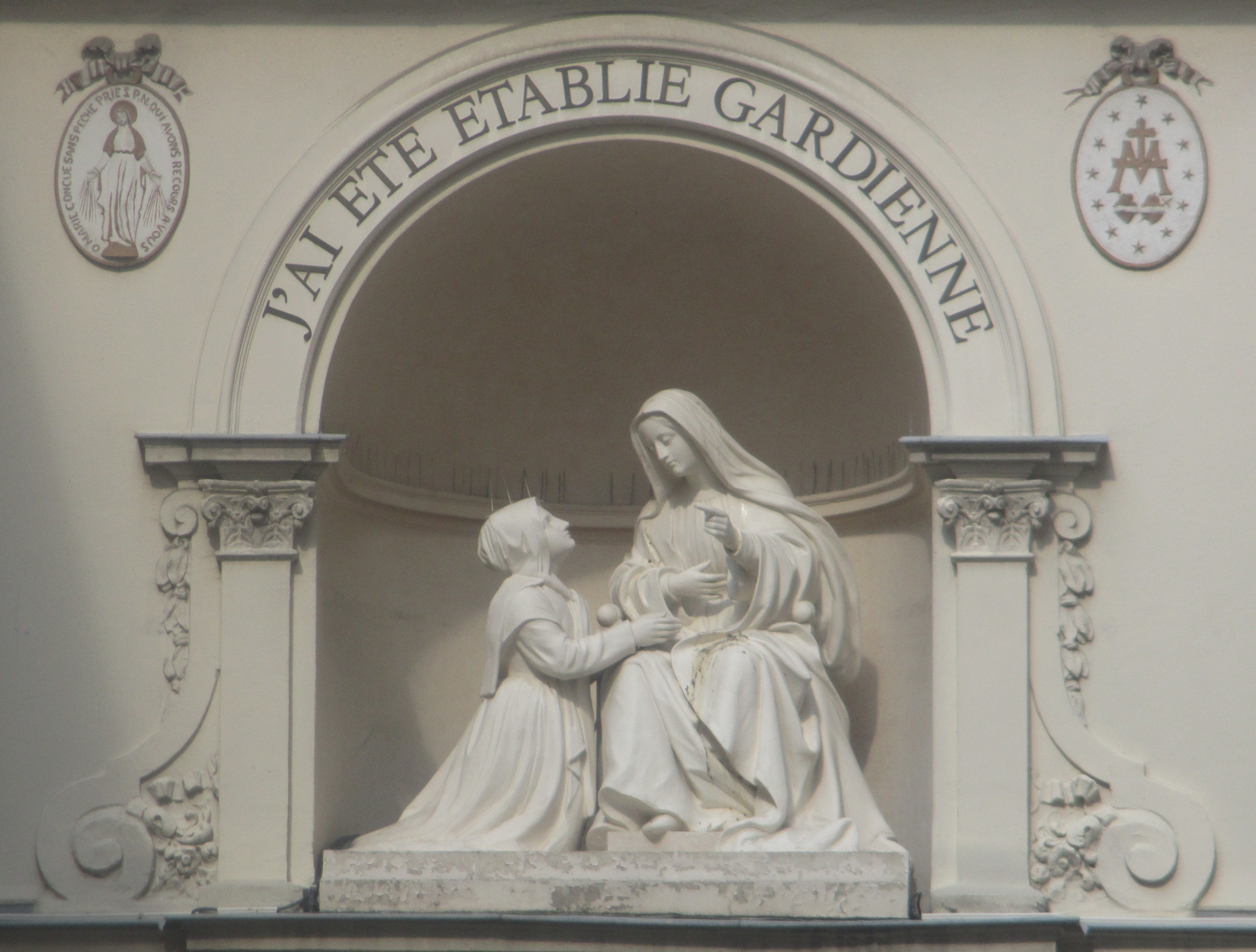 Groupe sculpté au-dessus du portail de la chapelle de la Médaille miraculeuse représentant Catherine Labouré aux pieds de la Vierge.